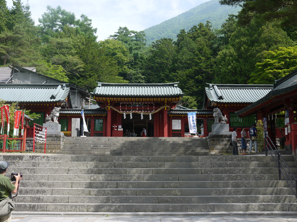 日光二荒山神社中宮祠 Nikko Futarasan jinja chuguji